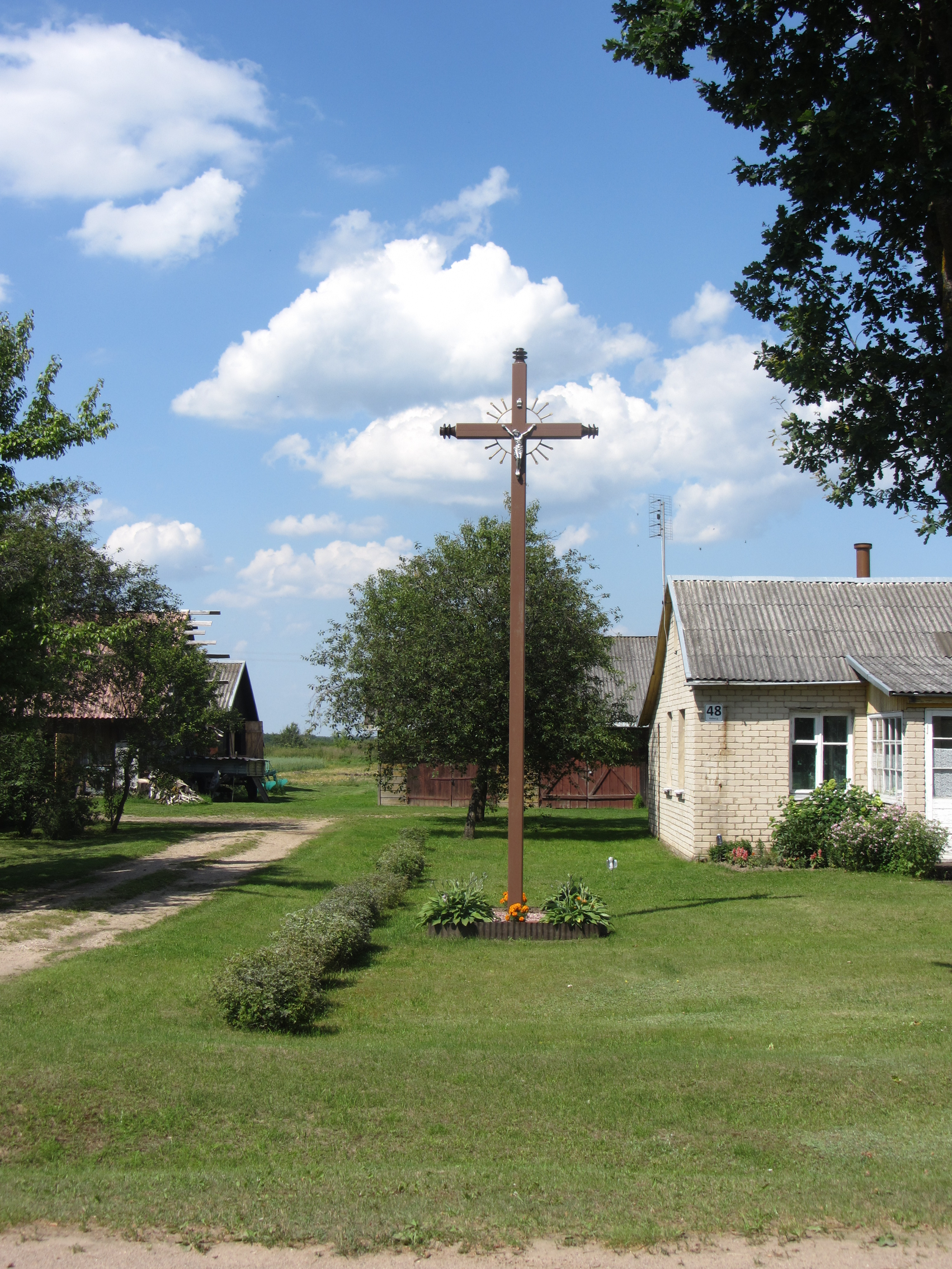 Navikai, Lithuania